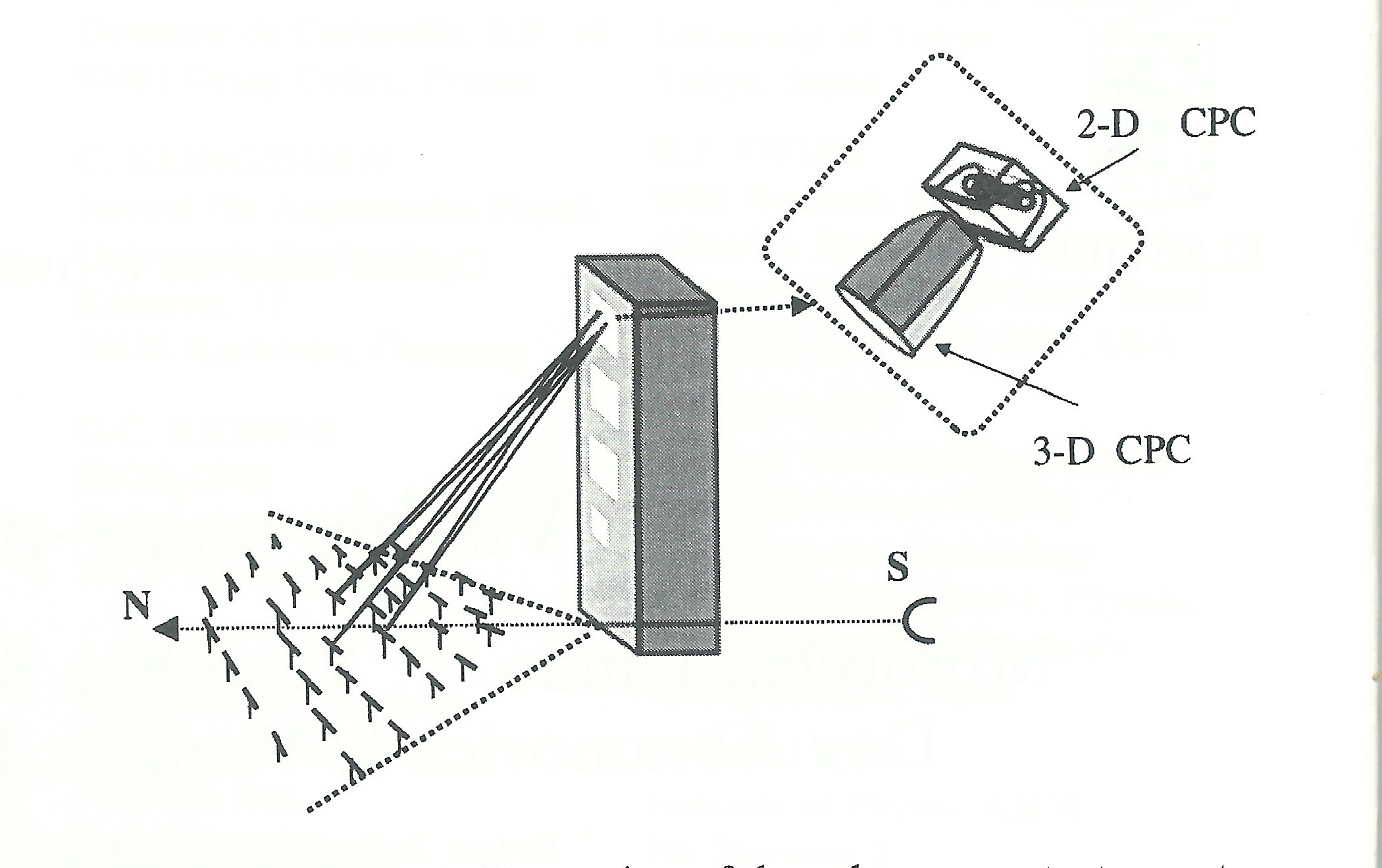 ריכוז אור תלת שלבי על מוט ניאודימיום-יאג במגדל השמש של מכון ויצמן. 12 הליוסטטים מרכזים אור על מרכז תלת-מימדי בקומה ה-12 של המגדל ומשם למרכז דו-מימדי שעל צירו נמצא מוט לייזר.